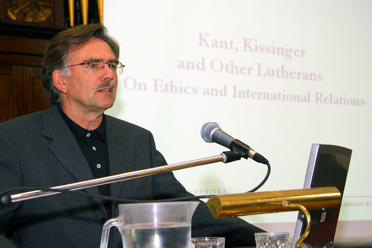 Foredrag i Societas Ethica Oxford 2006